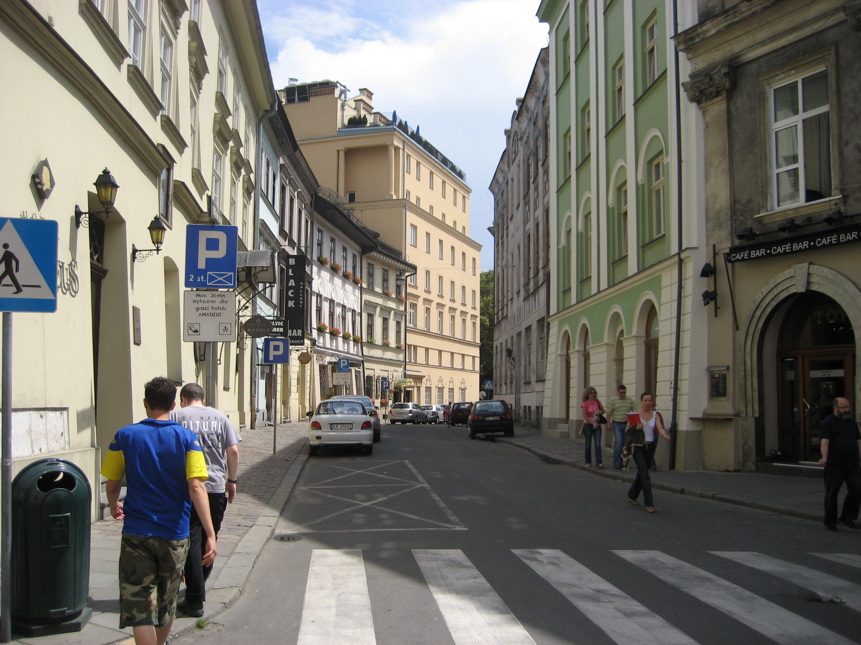 Kraków - ulica Mikołajska - view from ulica Świętego Krzyża towards East